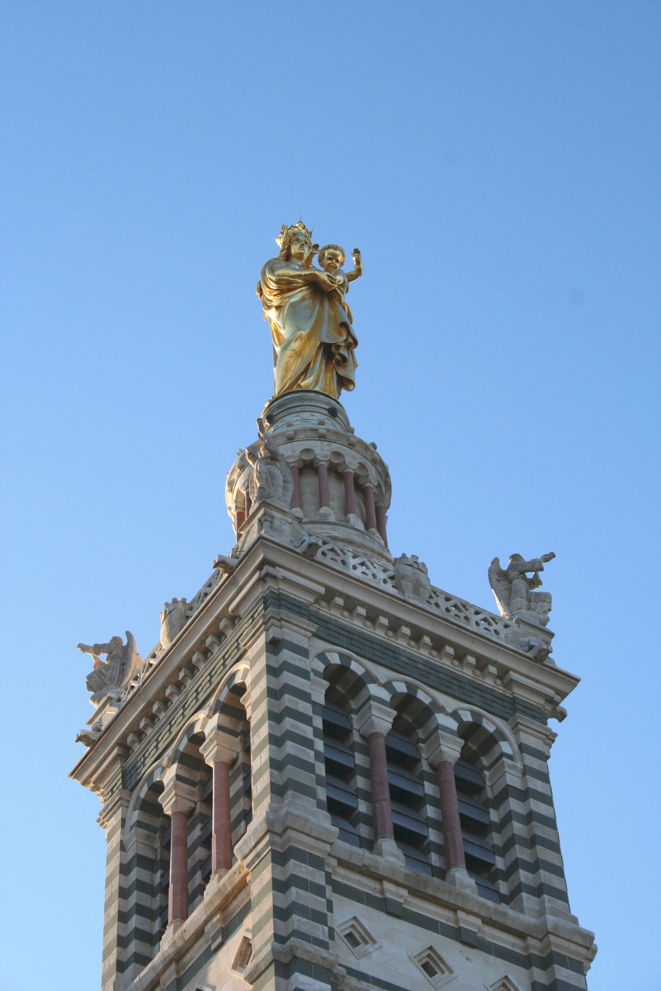 Notre-Dame de la Garde à Marseille, détail du beffroi, campanile et statue de la vierge à l'enfant.